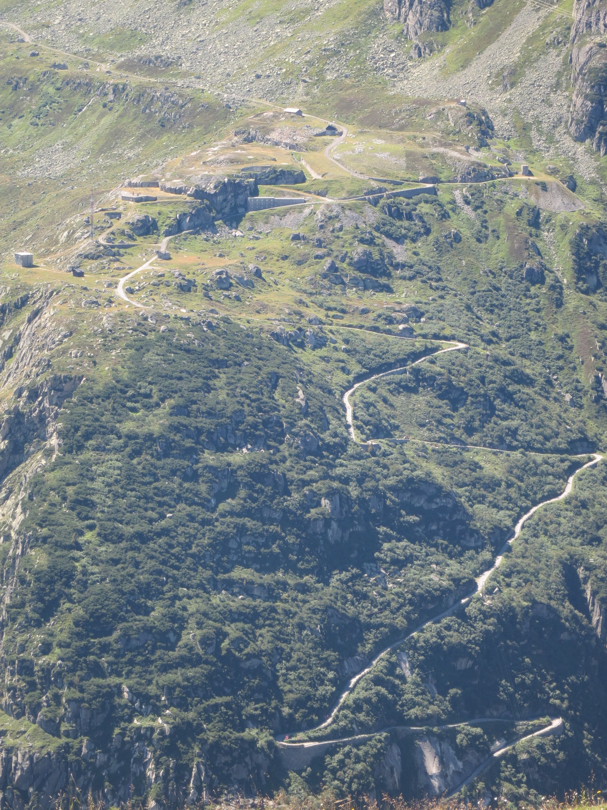 Fort Bäzberg, Andermatt UR, Schweiz